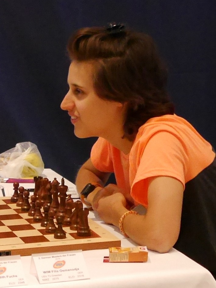 Filiz Osmanodja, German Masters 2016 in Dresden.